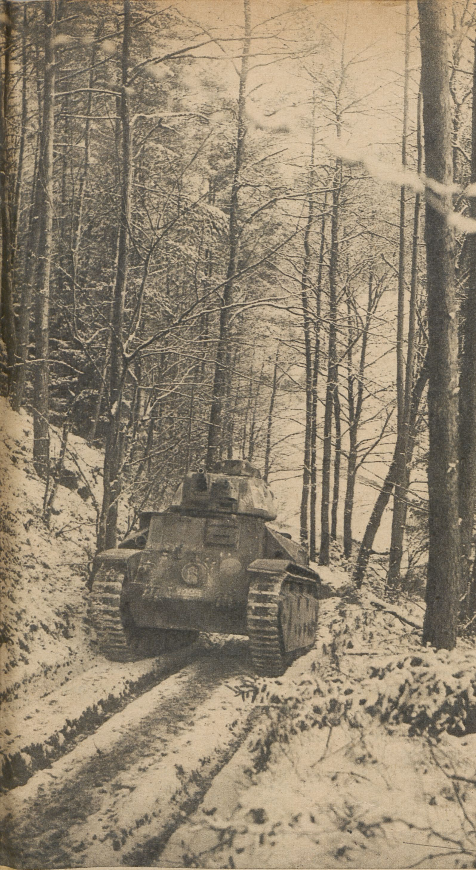 LES CHARS D'ASSAUT sont parfois conciliants et routiniers, et ils suivent alors docilement les voies et les chemins, même forestiers, dont leurs chenilles s'accommodent fort bien ; mais la neige ne les empêche pas de couper, s'il le faut, à travers champs et bois, et un arbre, même robuste, ne constitue pas un obstacle suffisant pour détourner le char de sa direction. Janvier 1940. [Char D2 2025 Yorktown du 19e BCC, Althorn, début janvier 1940]